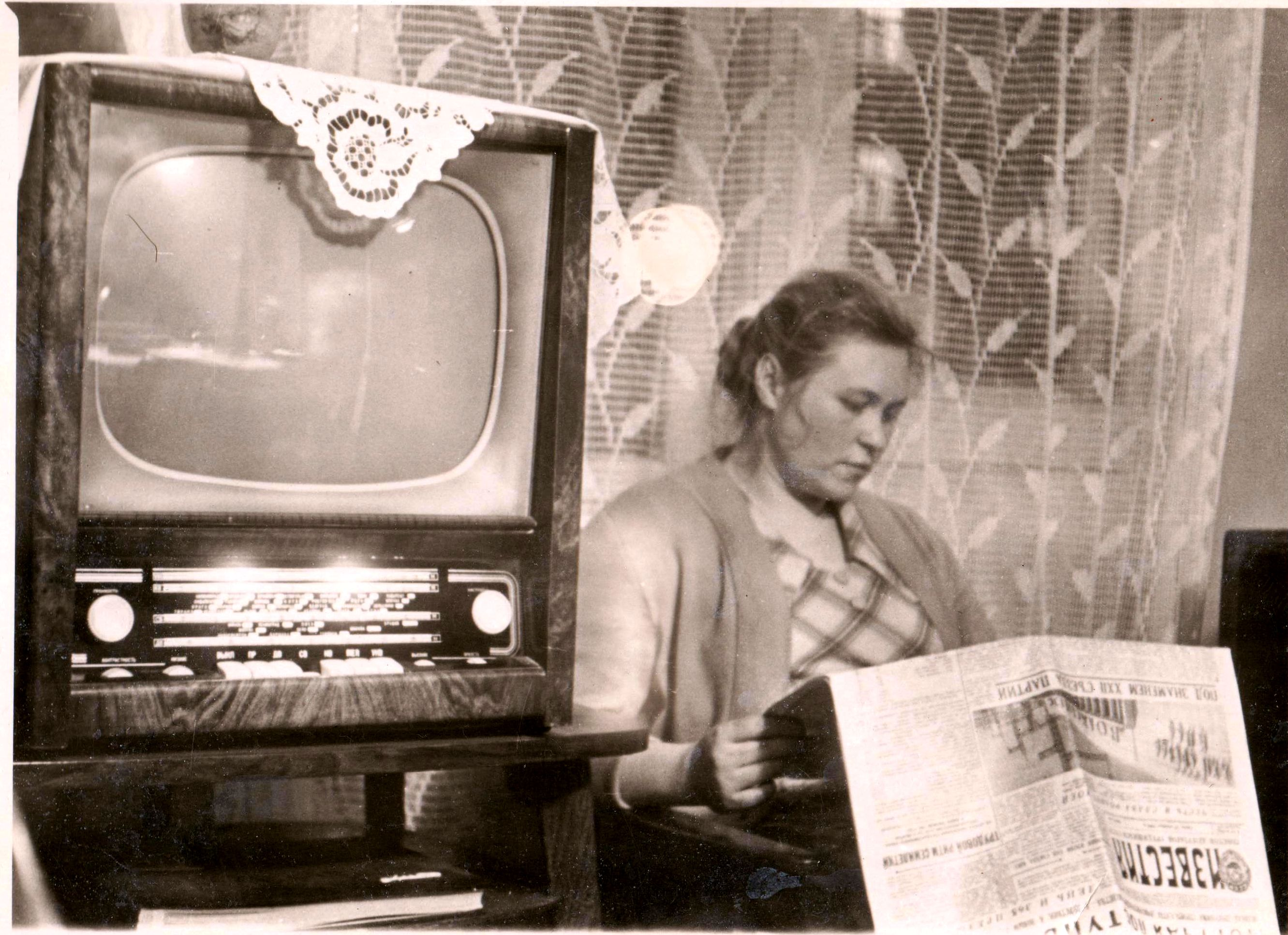 Телерадіола "Беларусь-5" в звичайному радянському домі.